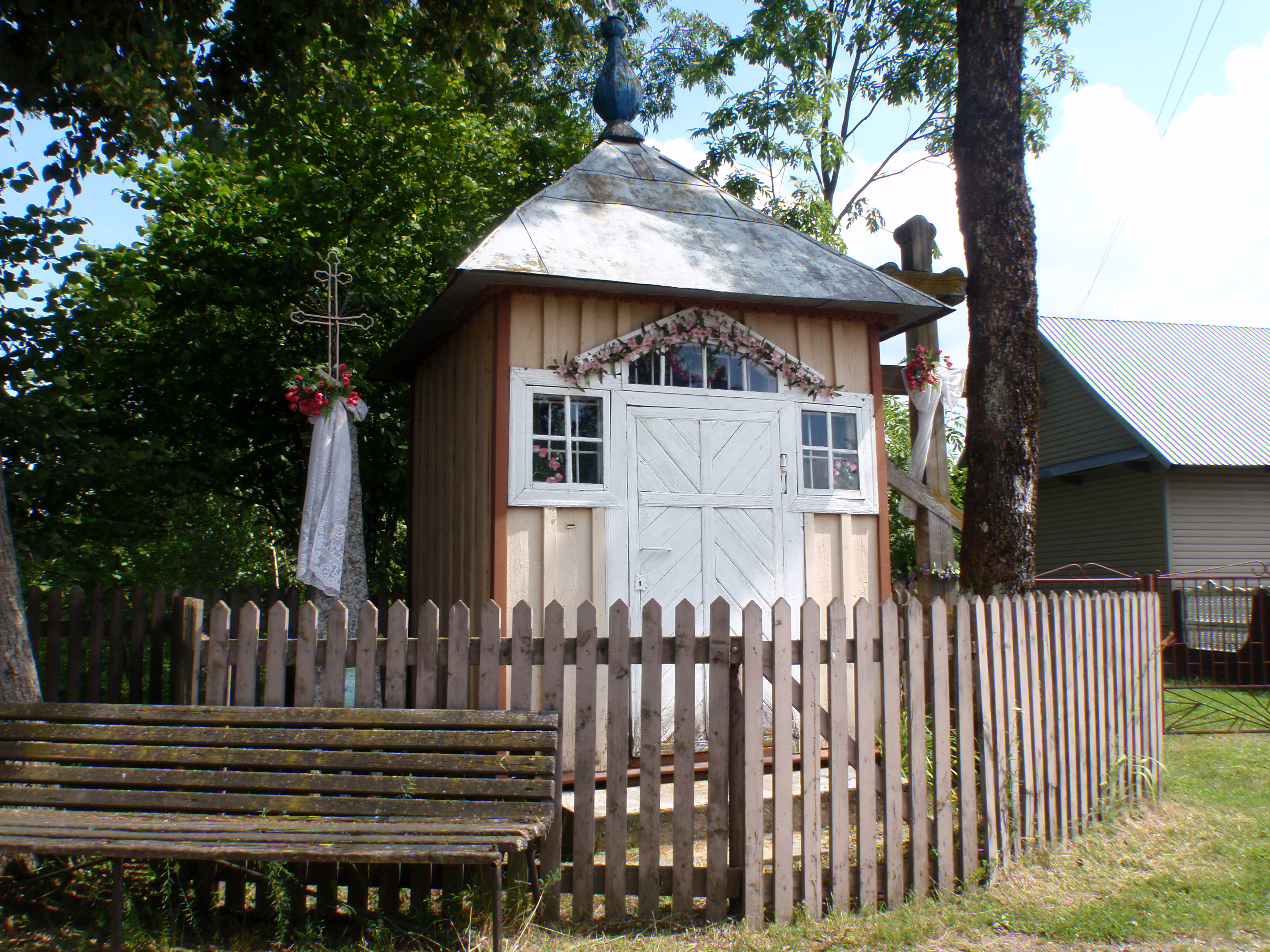 prawosławna kapliczka na południowym skraju wsi Czyżyki